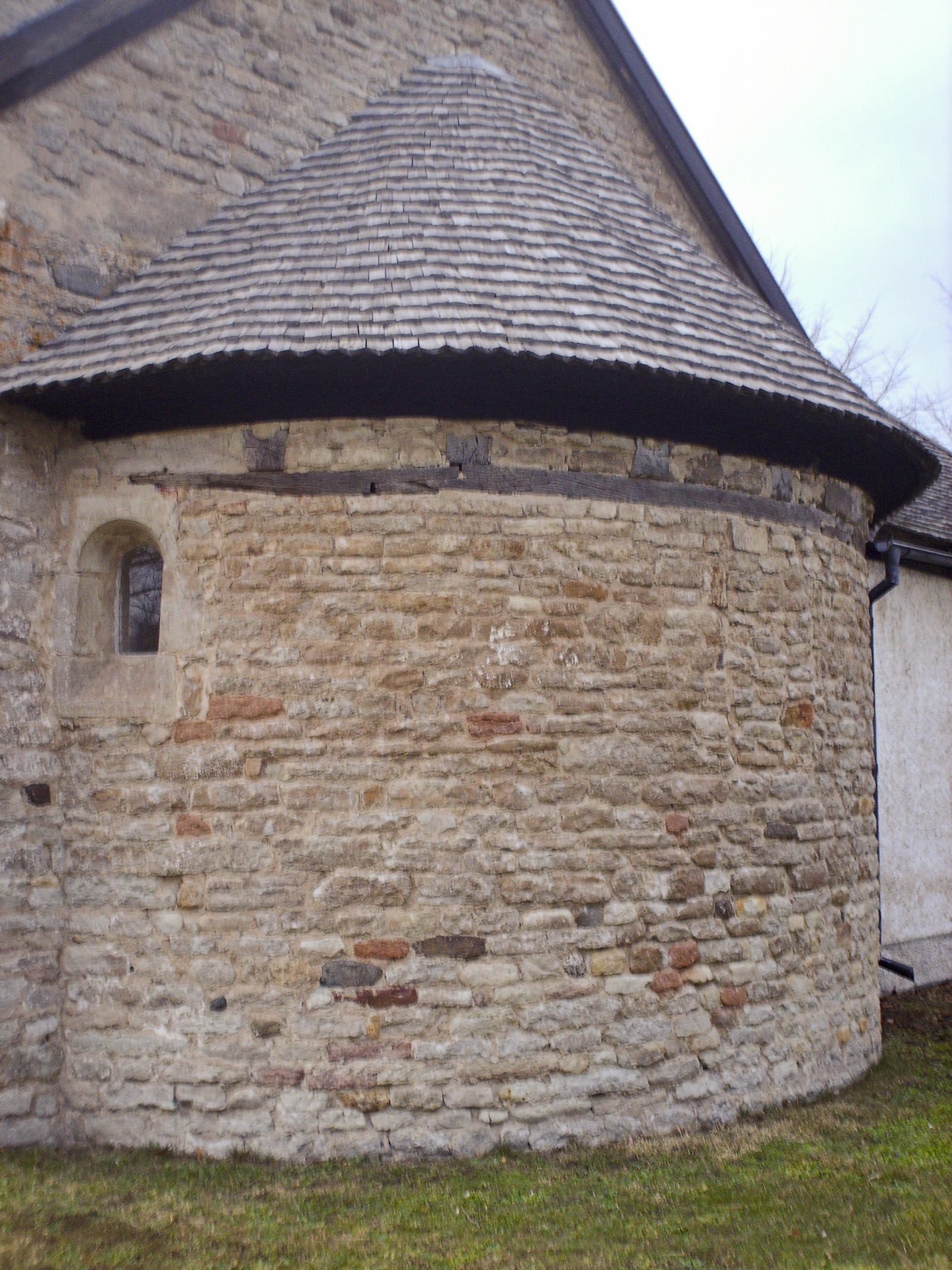 Absidkoret, Herrestads kyrka, Östergötland.